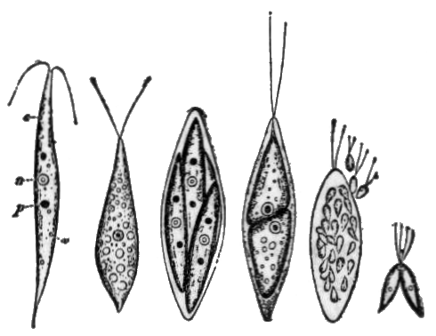 Chlorogonium euchlorum